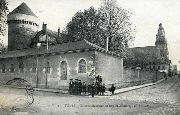 La caserne Meusnier à Tours, angle de l'actuelle avenue André Malraux et de la rue Lavoisier (anc. Saint-Maurice) par laquelle se fait l'entrée. Vue sur la tour de Guise et le château. En arrière plan la cathédrale Saint-Gatien.